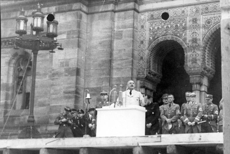 Jul. Streicher spricht anl. des Abbruchs der Synagoge am 11.8.38 Autor: Weber